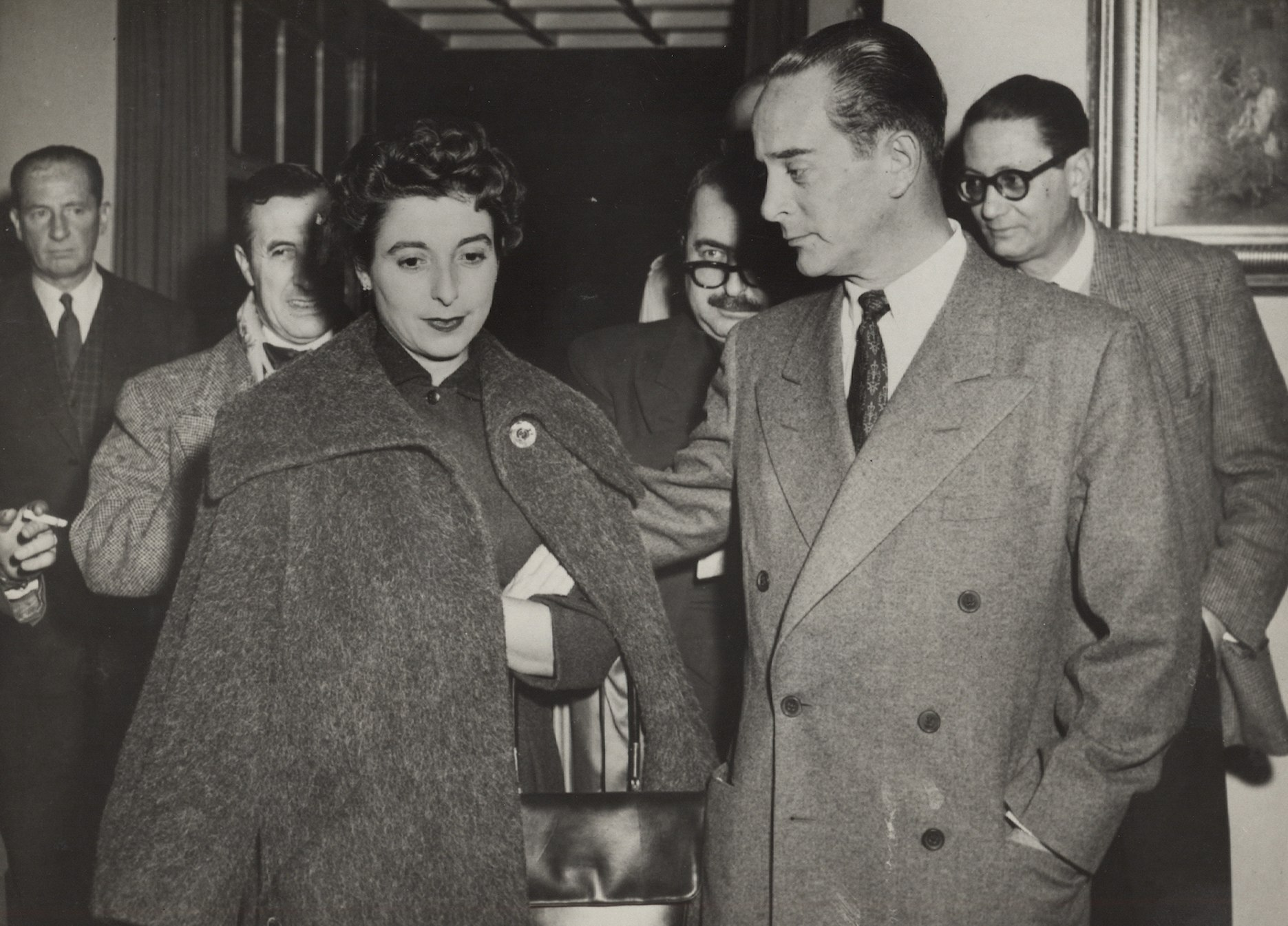 Fundo Correio da Manhã.